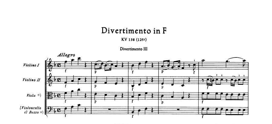 Mozart K.138の第1楽章冒頭部